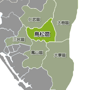 鳥松趨相對位置